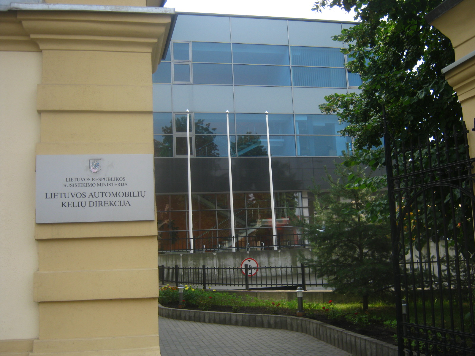 Lietuvos automobilių kelių direkcija